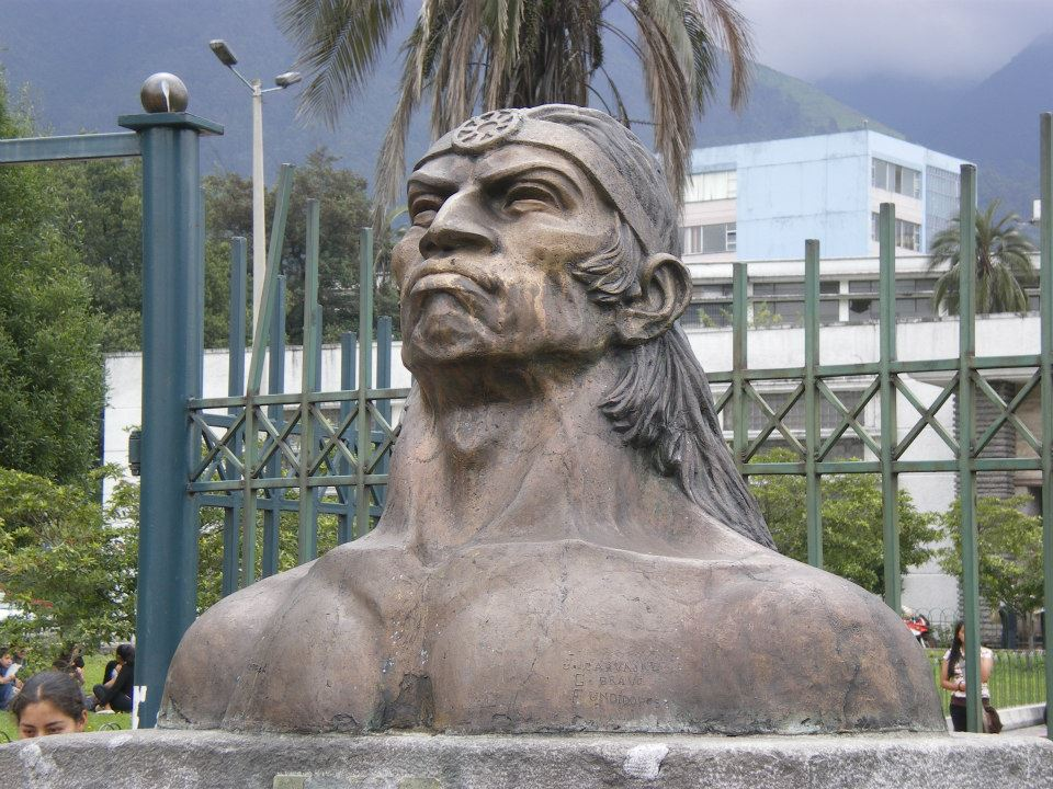 Rumiñahui (Quito, 1490 – Quito, 25 de junio 1535) fue un general quiteño inca, uno de los más hábiles de Huayna Capac, pero luego de su muerte sirvió a su hijo, Atahualpa. Estuvo a cargo de las acciones militares durante la Guerra Civil entre los hermanos Huáscar y Atahualpa, en el bando de Atahualpa. Su nombre se traduce tradicionalmente como "Cara de Piedra" aunque podría ser también "Vista de Pedernal".